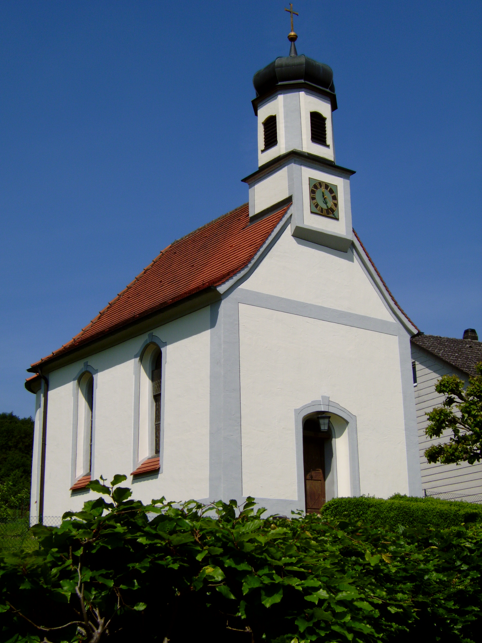 d 89584 Erbstetten-Unterwilzingen: Kapelle St. Georg